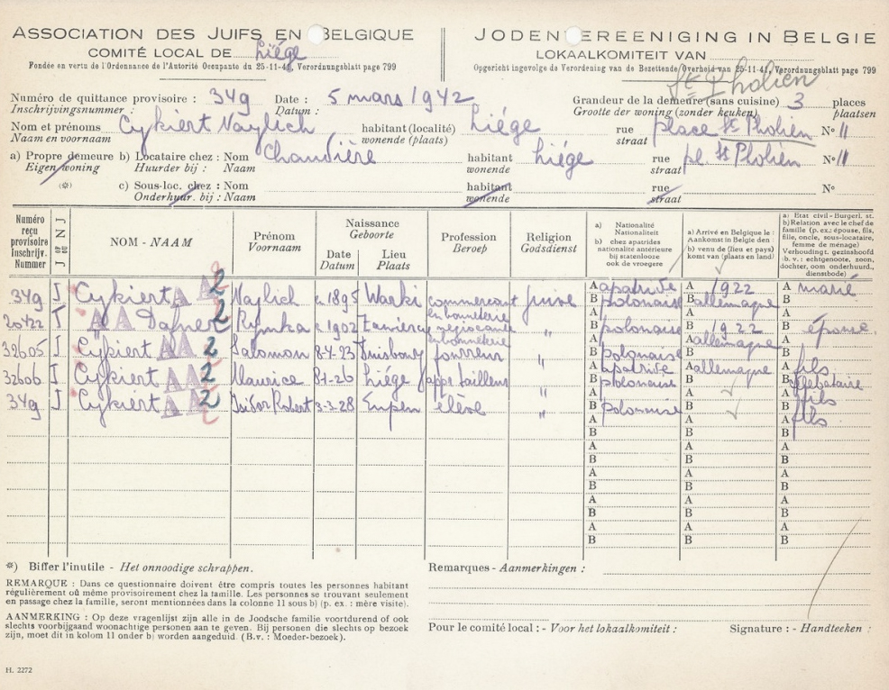 Listing établi par l'AJB en 1942 - Domaine public